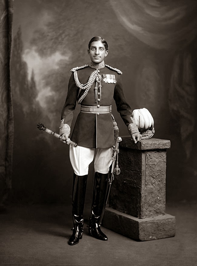 HH Tukoji Rao Holkar, Maharaja of Indore (1890-1978)